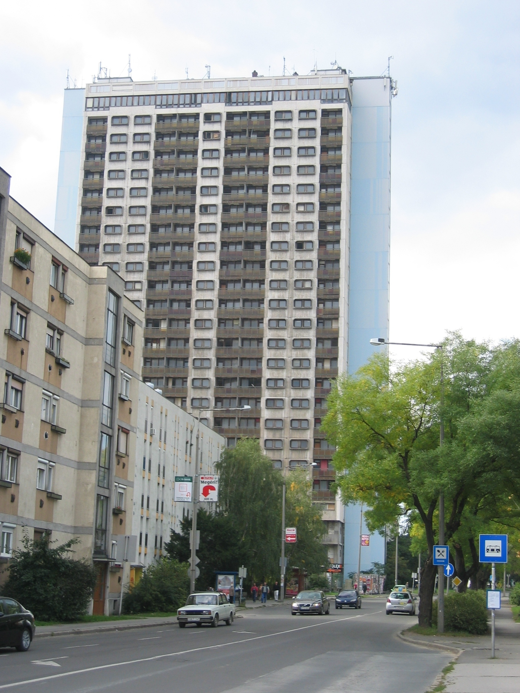 Das Magasház Hochhaus 2008. Pécs